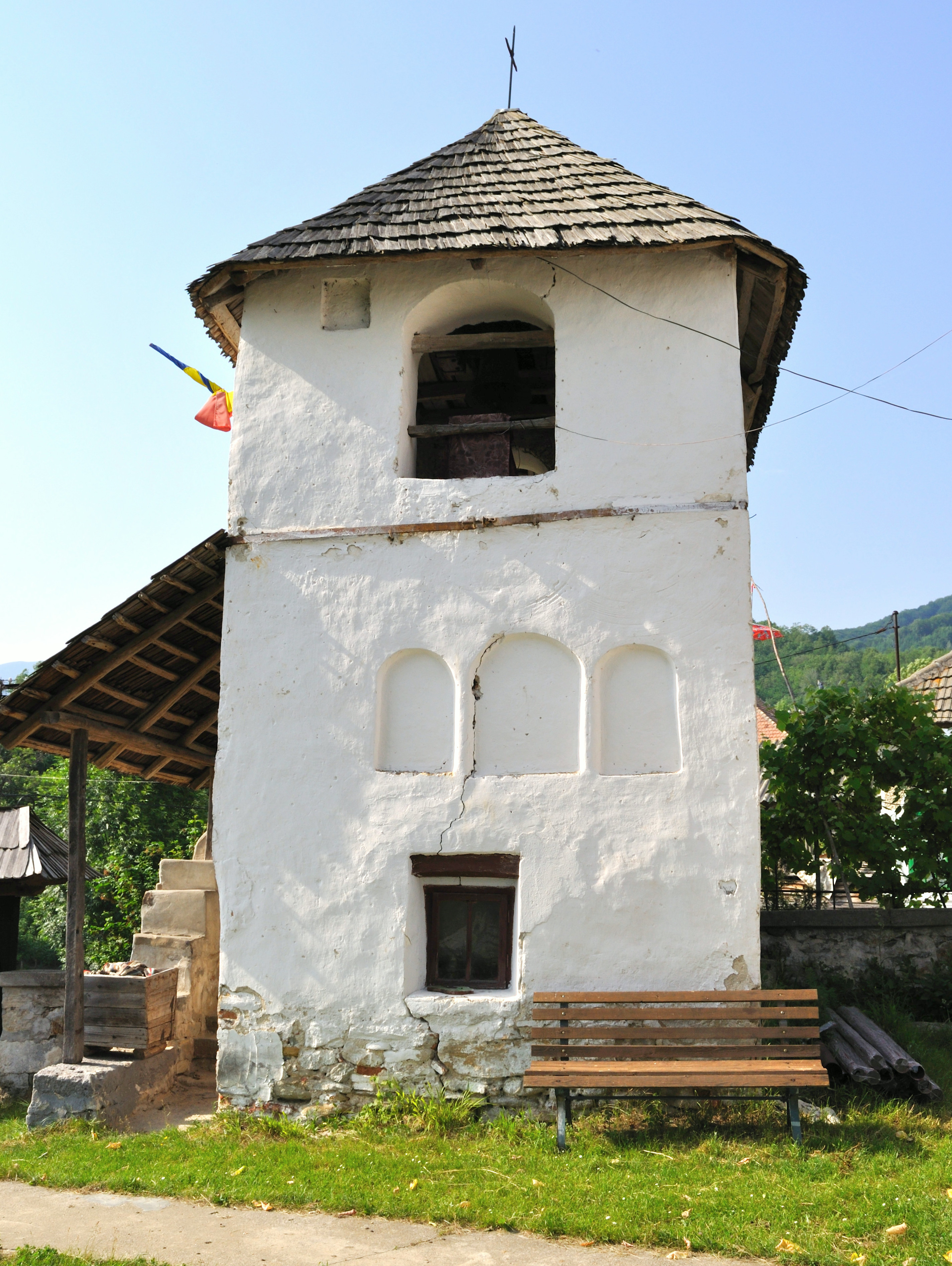 Biserica „Intrarea în Biserică a Maicii Domnului” din satul Bărbătești, cătunul Mierlești, județul Vâlcea